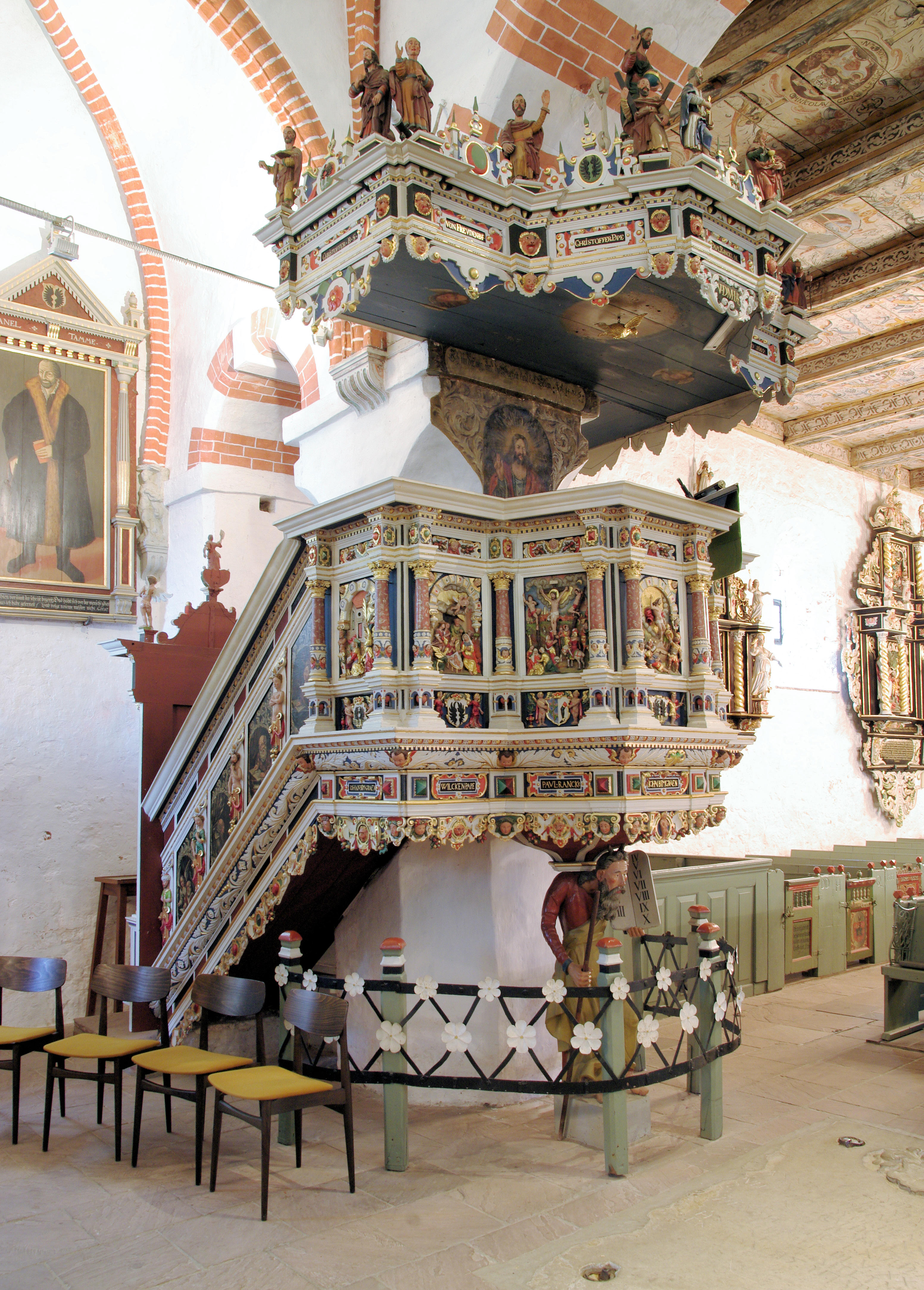 Die Kanzel vom Altar aus gesehen